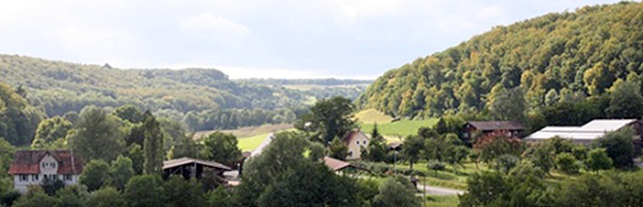 Kirbachhof im Kirbachtal von Osten